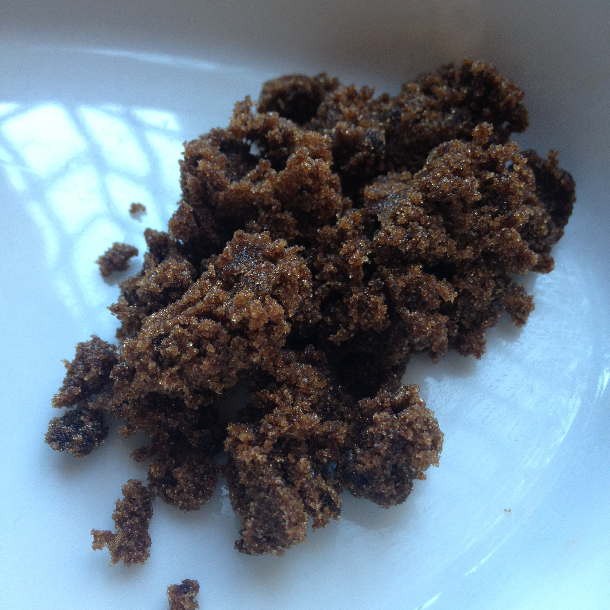 Fotografia del sucre ,melassa realitzada en el laboratori de la UB del Campus d'Alimentació de Torribera.